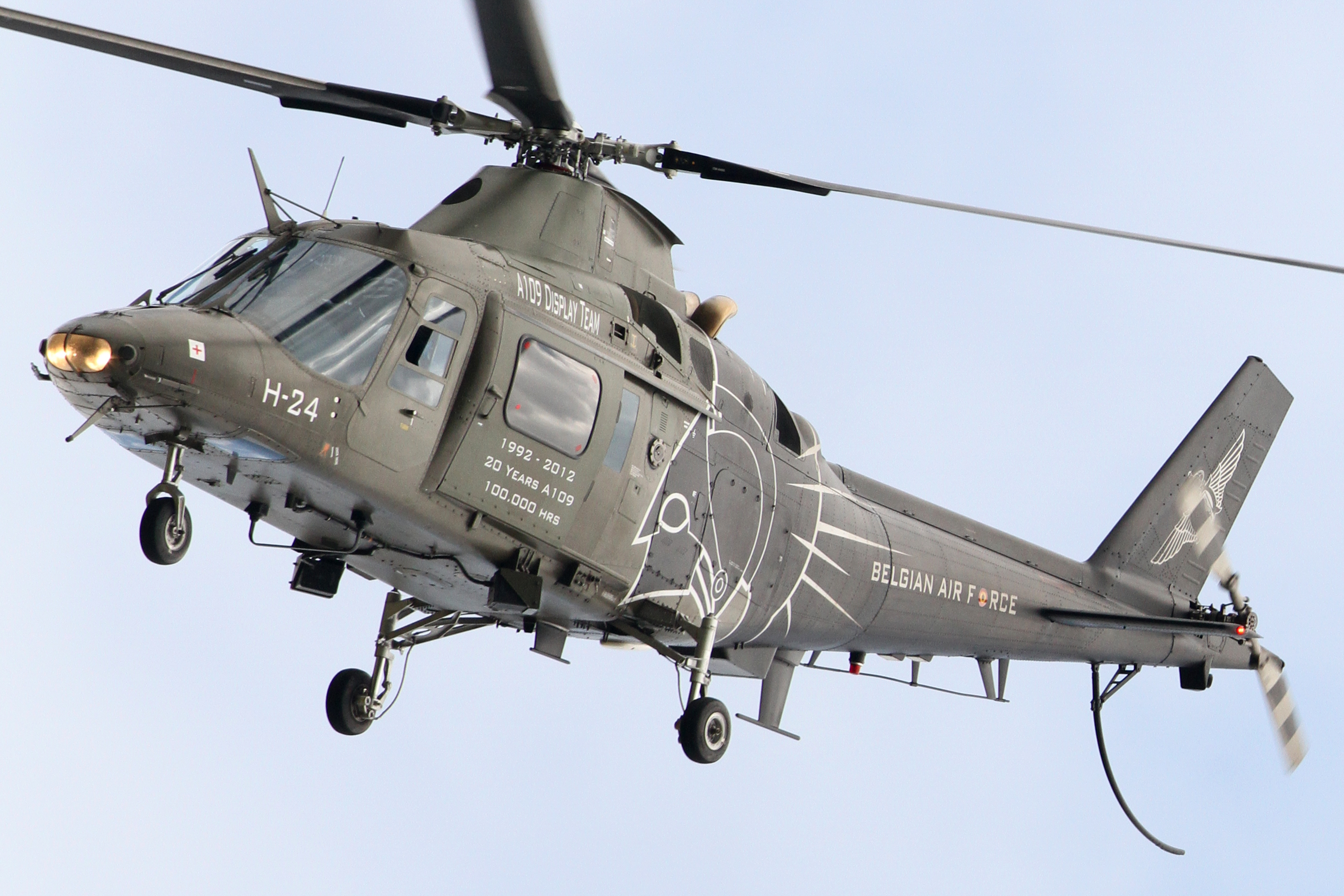 Agusta A109BA 5